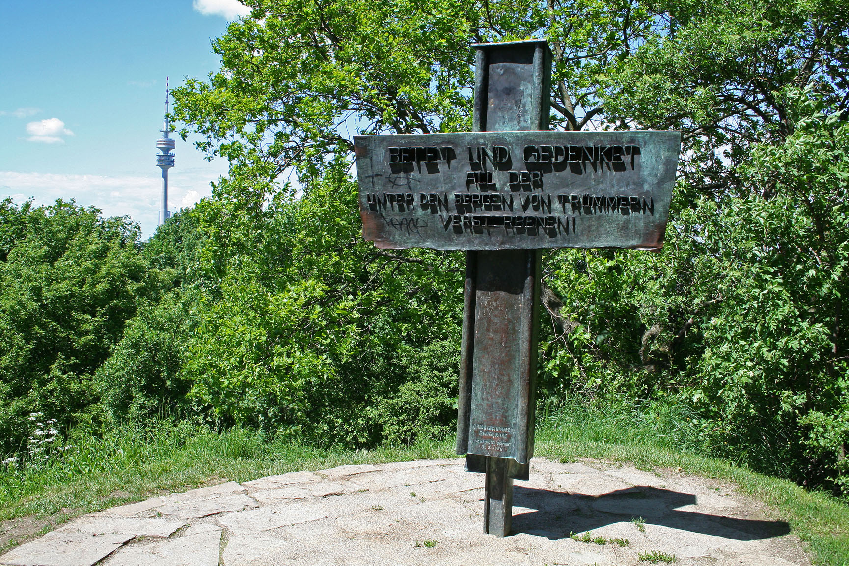 Gipfelkreuz des Luitpoldhügels in München